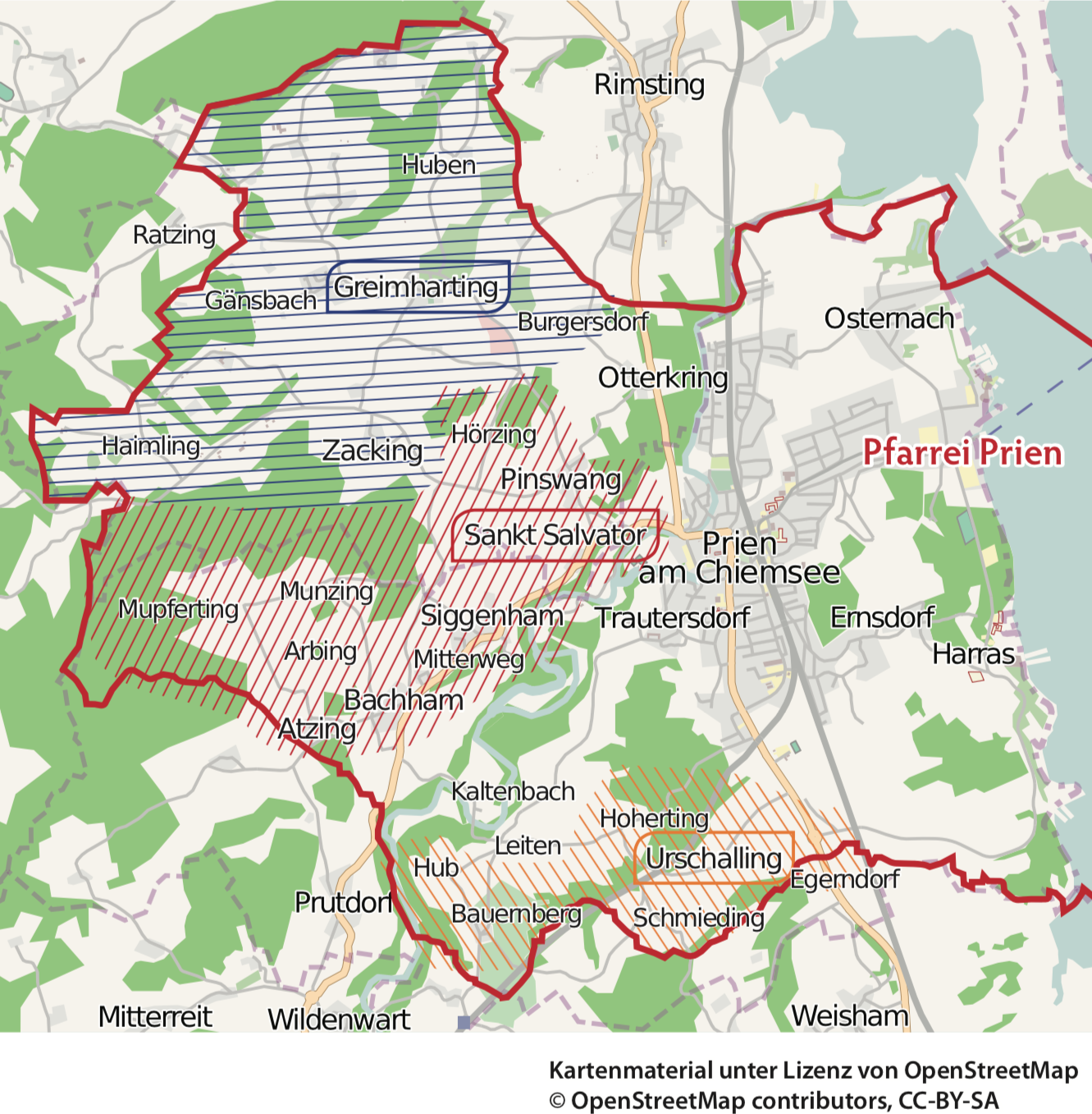 Kartendarstellung der Kreuztrachten der Priener Filialkirchen Greimharting, St. Salvator und Urschalling.